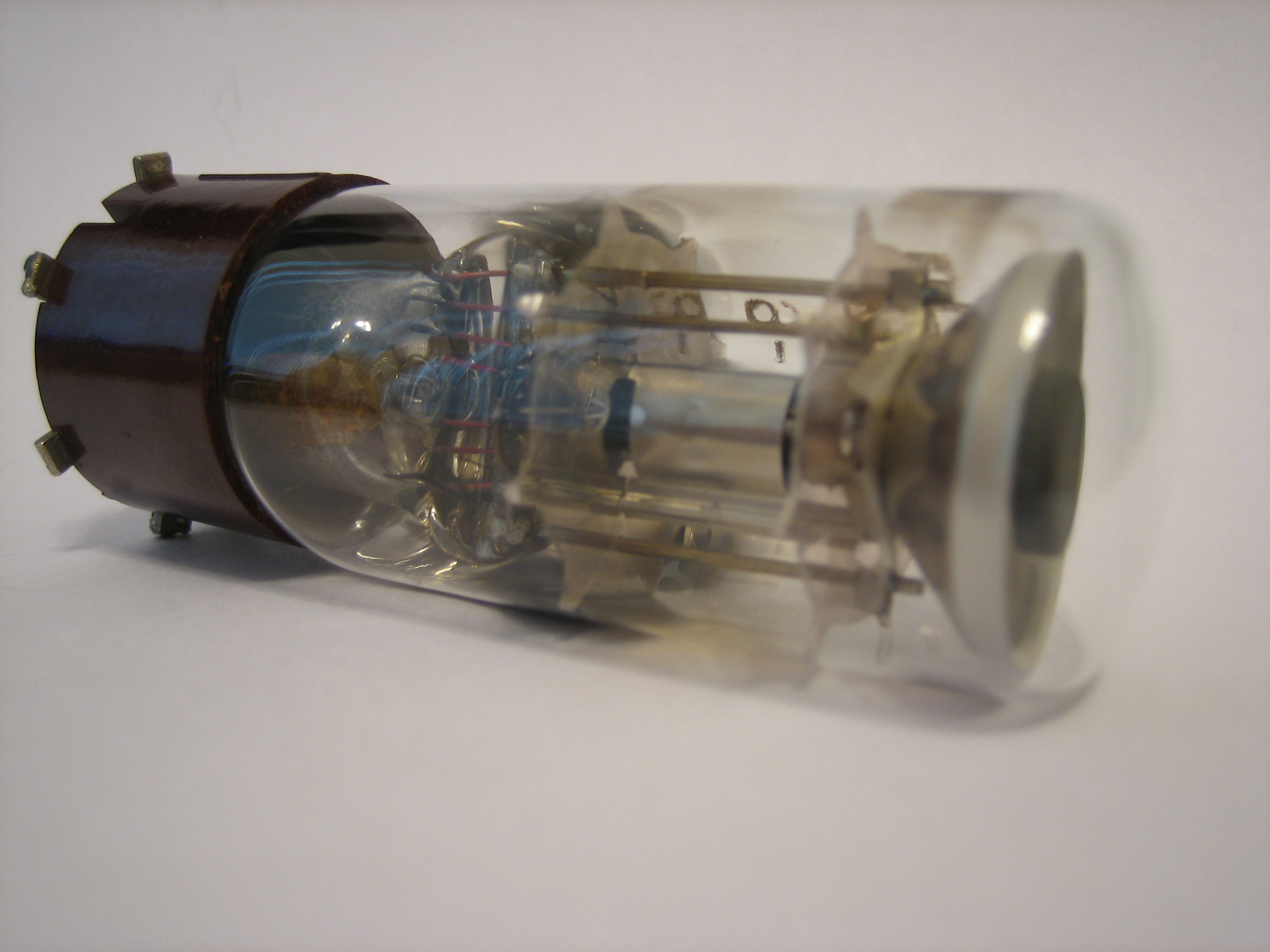 Lampa EM4 produkcji zakładów TELAM (styczeń 1961)